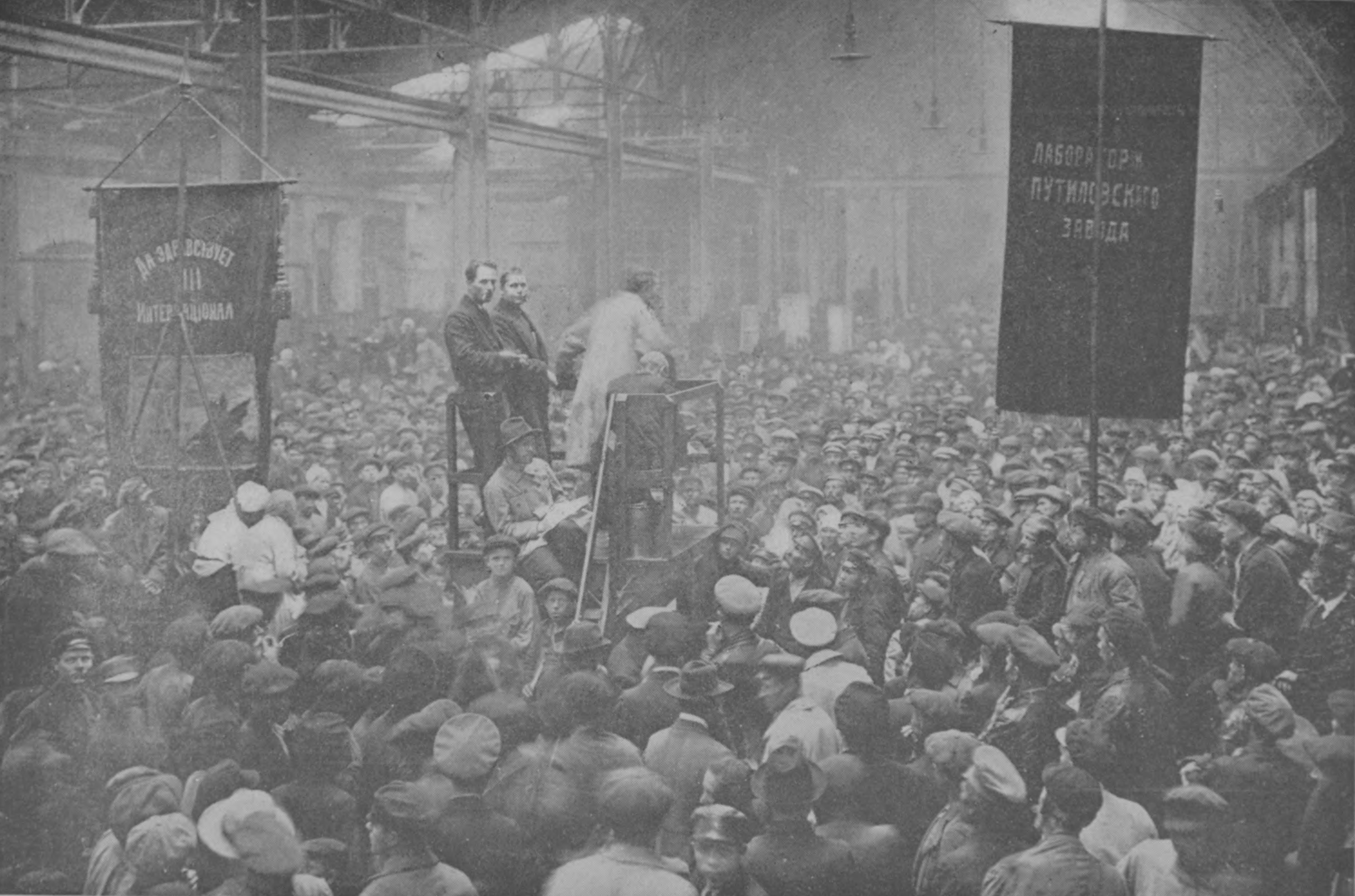 Reunión política en la fábrica Putilov, Petrogrado.